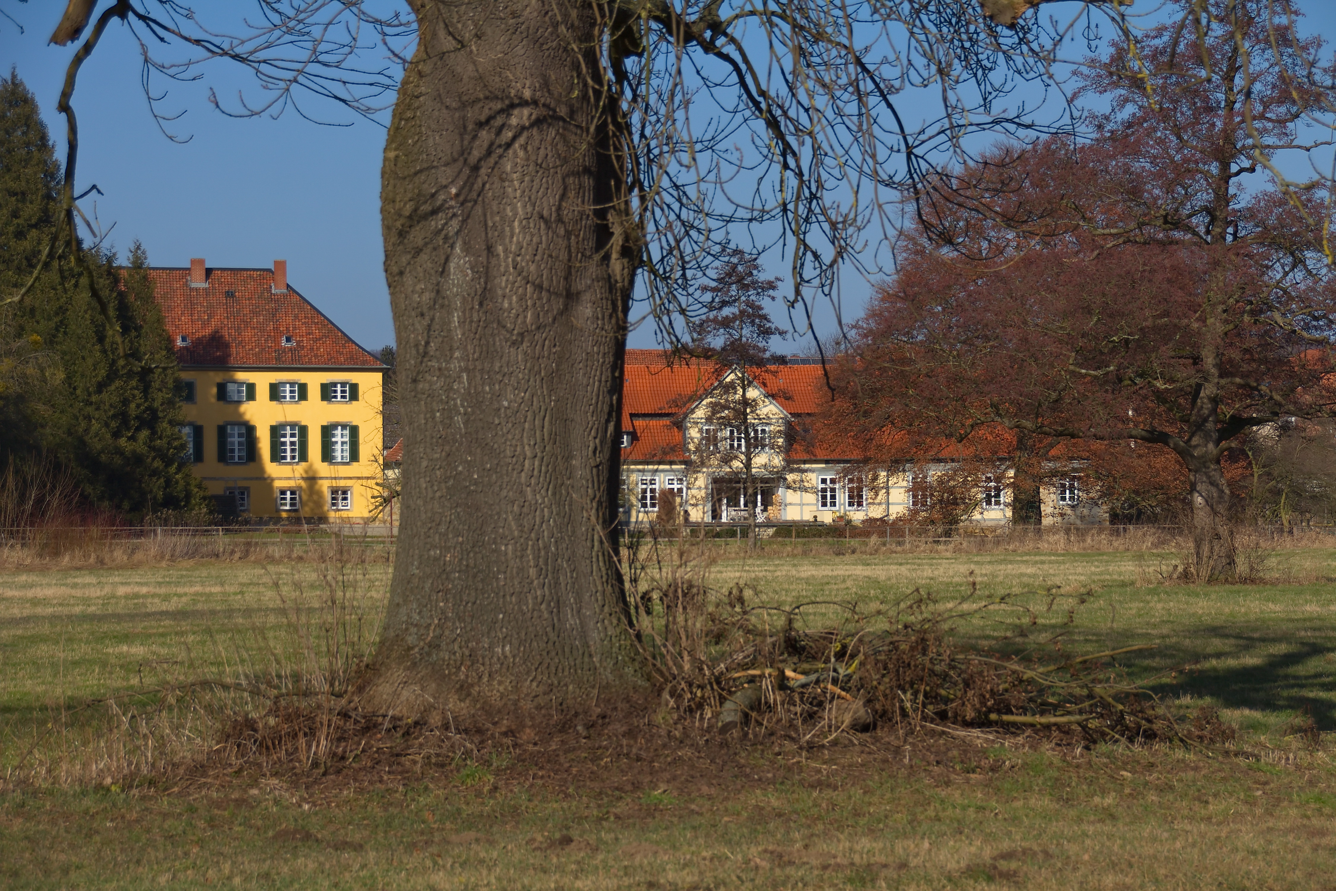 Gut Kielmannsegg in Heinde (Bad Salzdetfurth), Niedersachsen, Deutschland